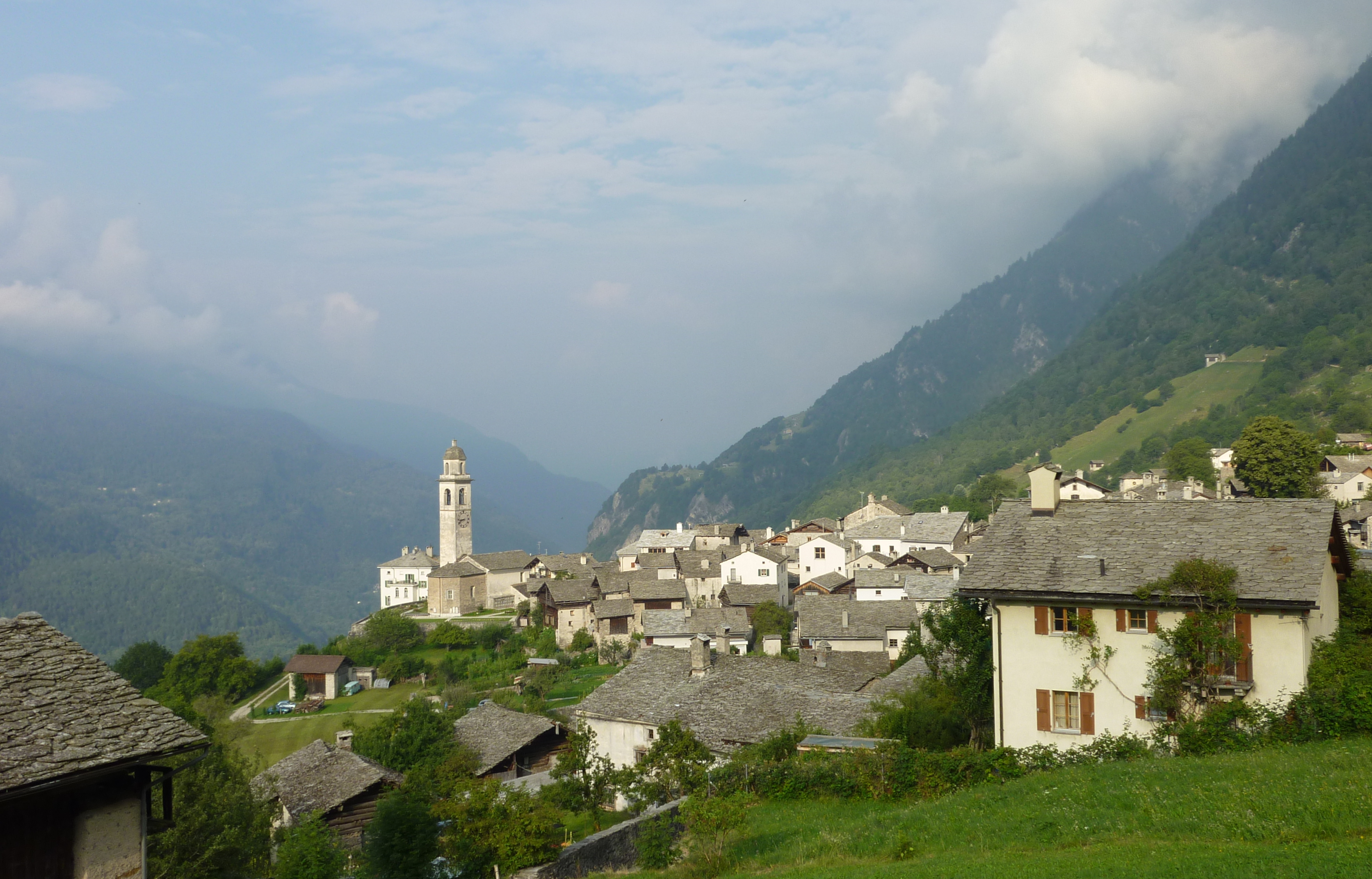 Soglio GR